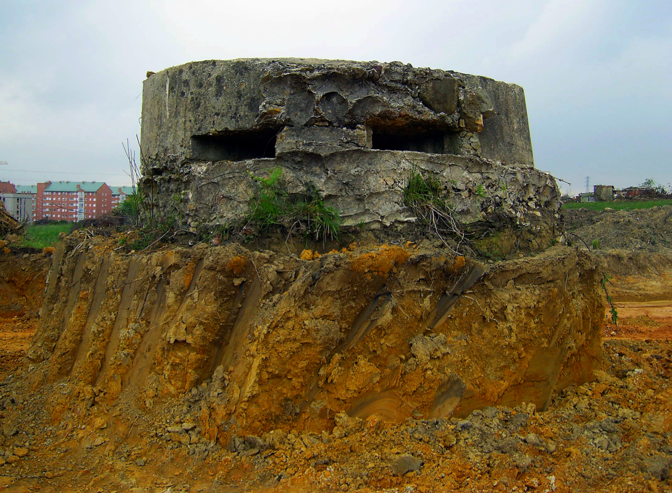 Arquitectura militar de la guerra civil española. Asentamiento para arma automática (nido de ametralladora). Prado de la Vega, Oviedo. Principado de Asturias